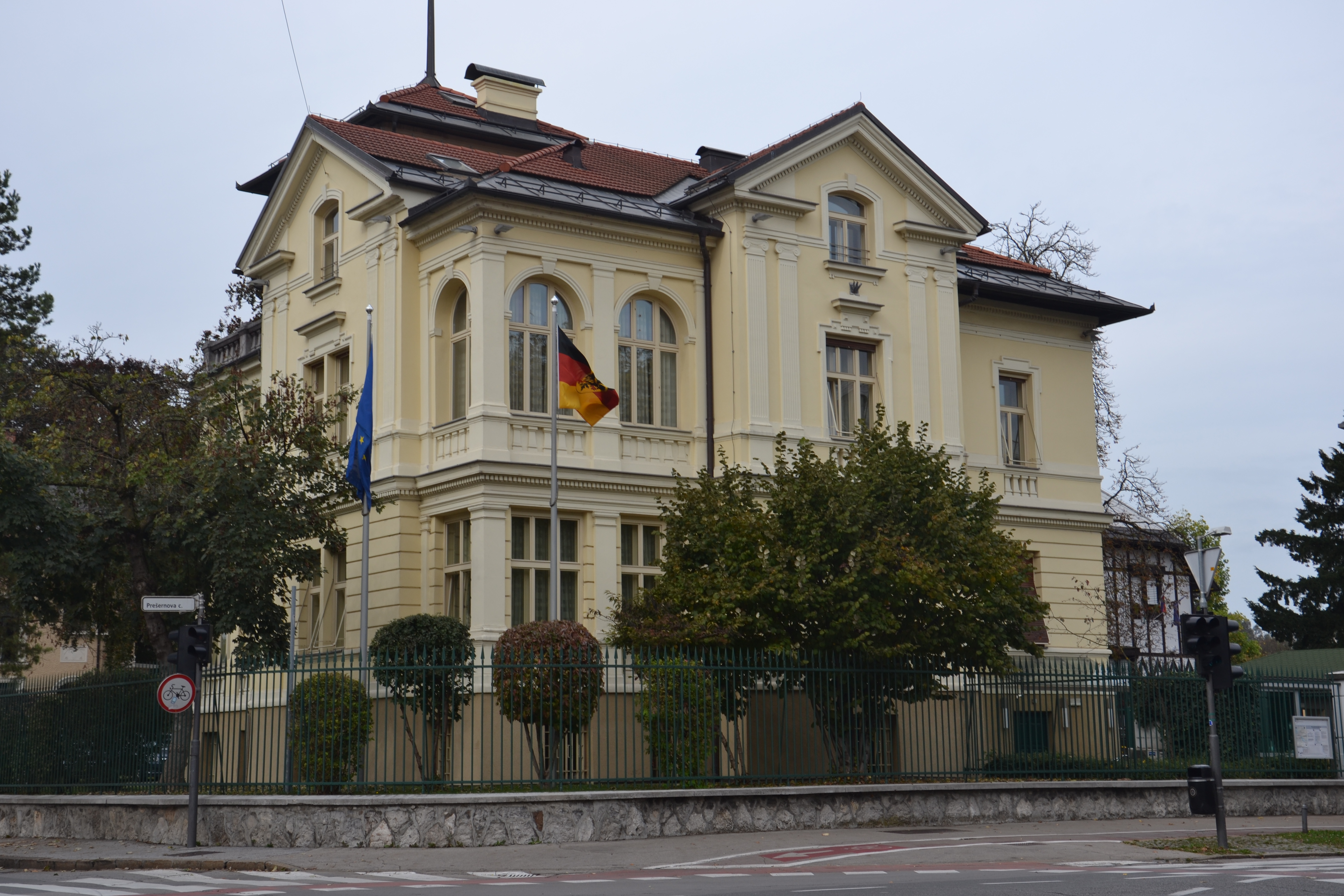 Nemško veleposlaništvo v Ljubljani, Slovenija